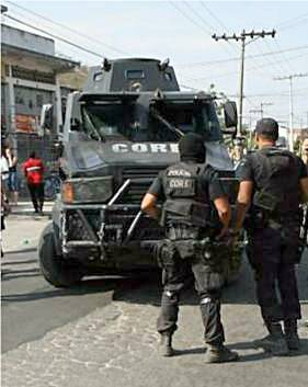 Special police car of Rio de Janeiro